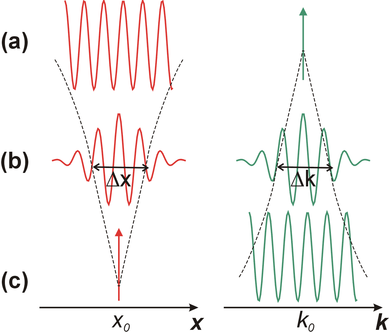 Dualité onde-corpuscule. Représentation 1D en espace et en fréquence de : a) une onde : objet localisé en fréquence. b) un paquet d'onde : cas général. c) un corpuscule : objet localisé en espace.